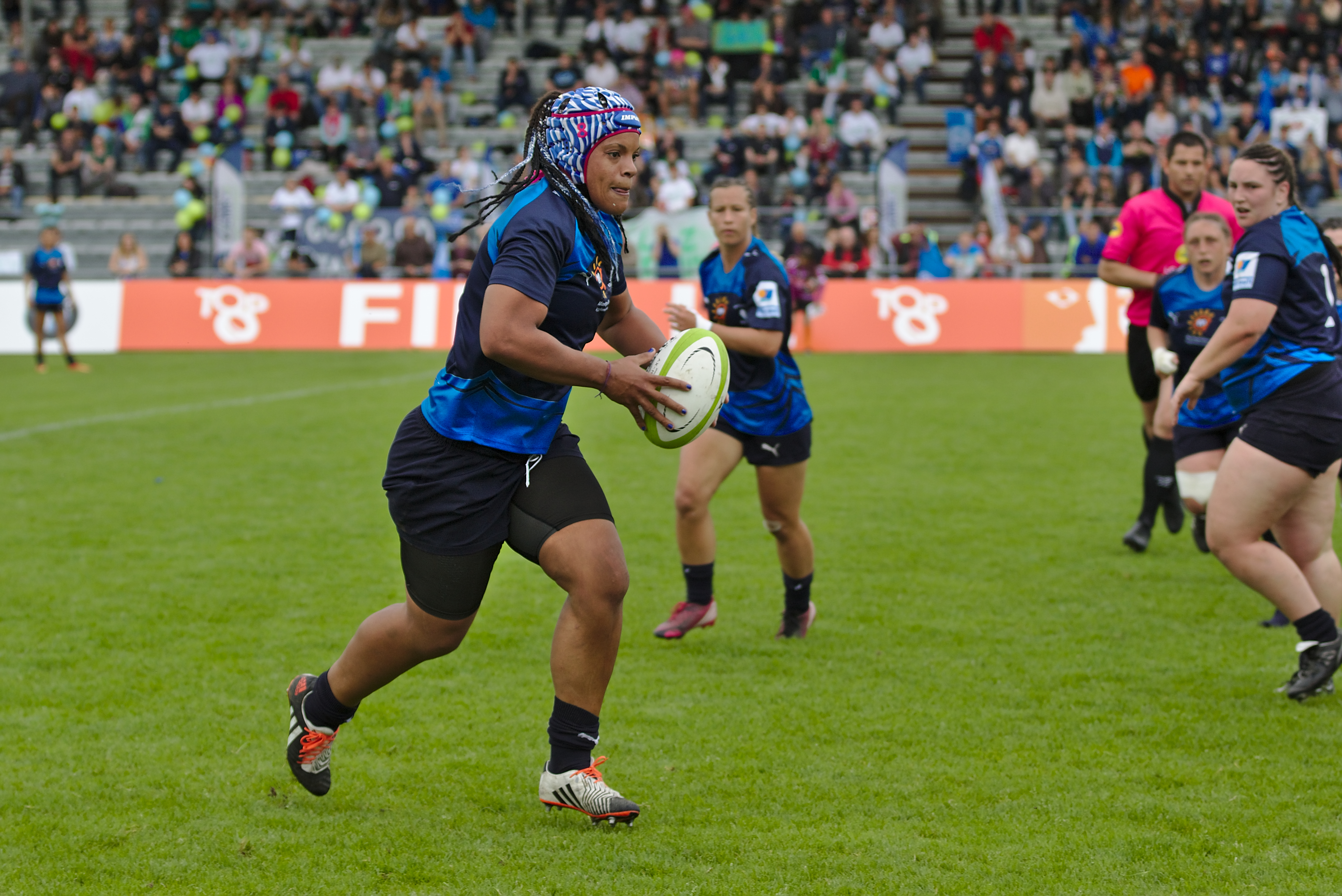 Finale Top 8 2015 - MHR vs LMRCV - 20150502